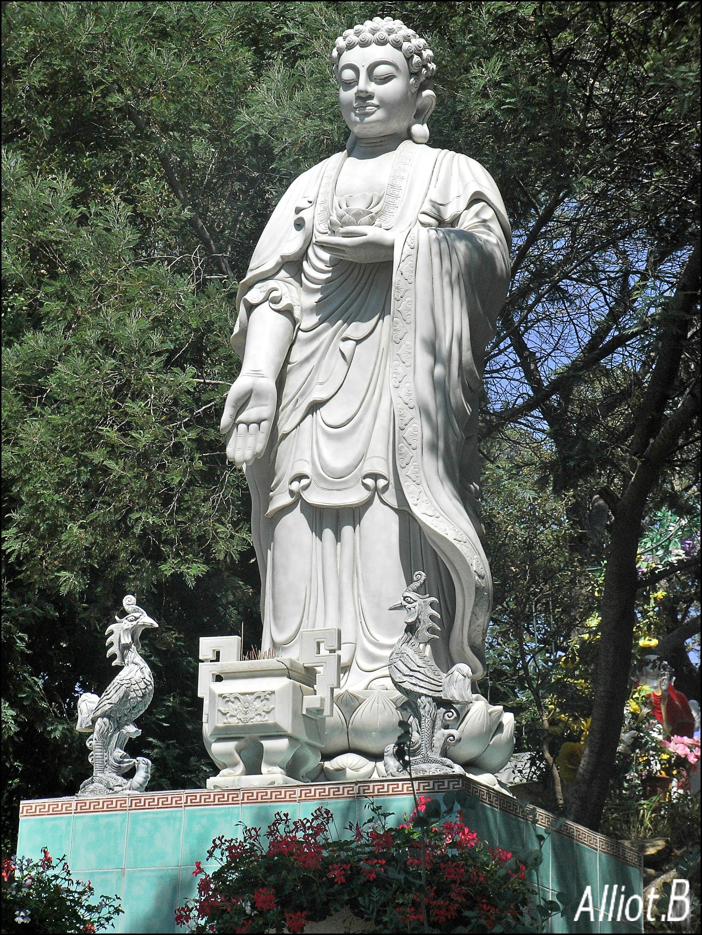 Statue de Bodhisattva - Pagode bouddhique de Hông Hien, Fréjus.